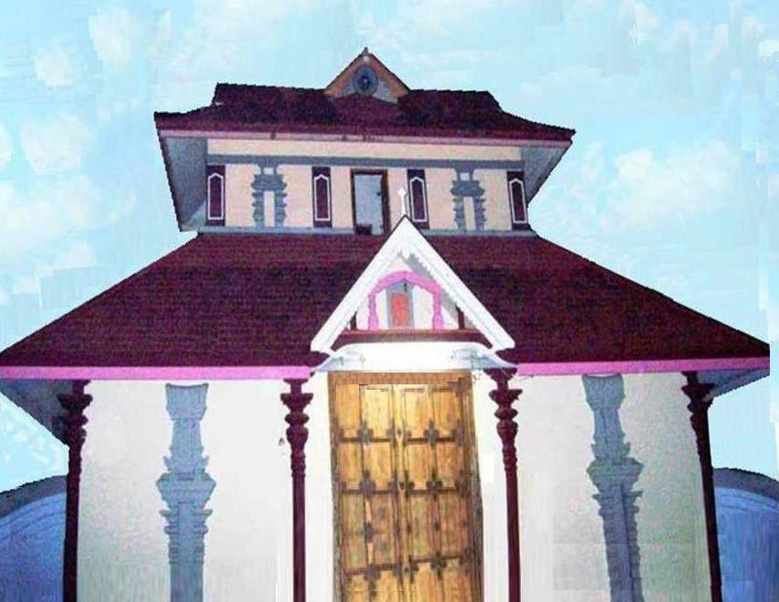 തിരുവിമ്പിലപ്പൻ ക്ഷേത്രം